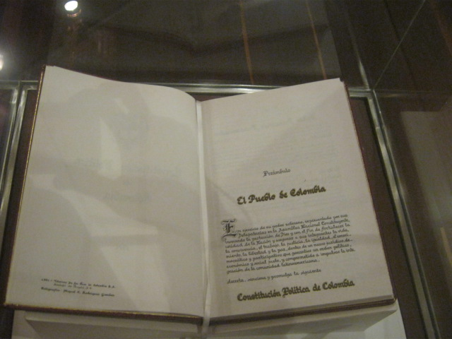 Constitución de 1991 en el Museo Nacional de colombia